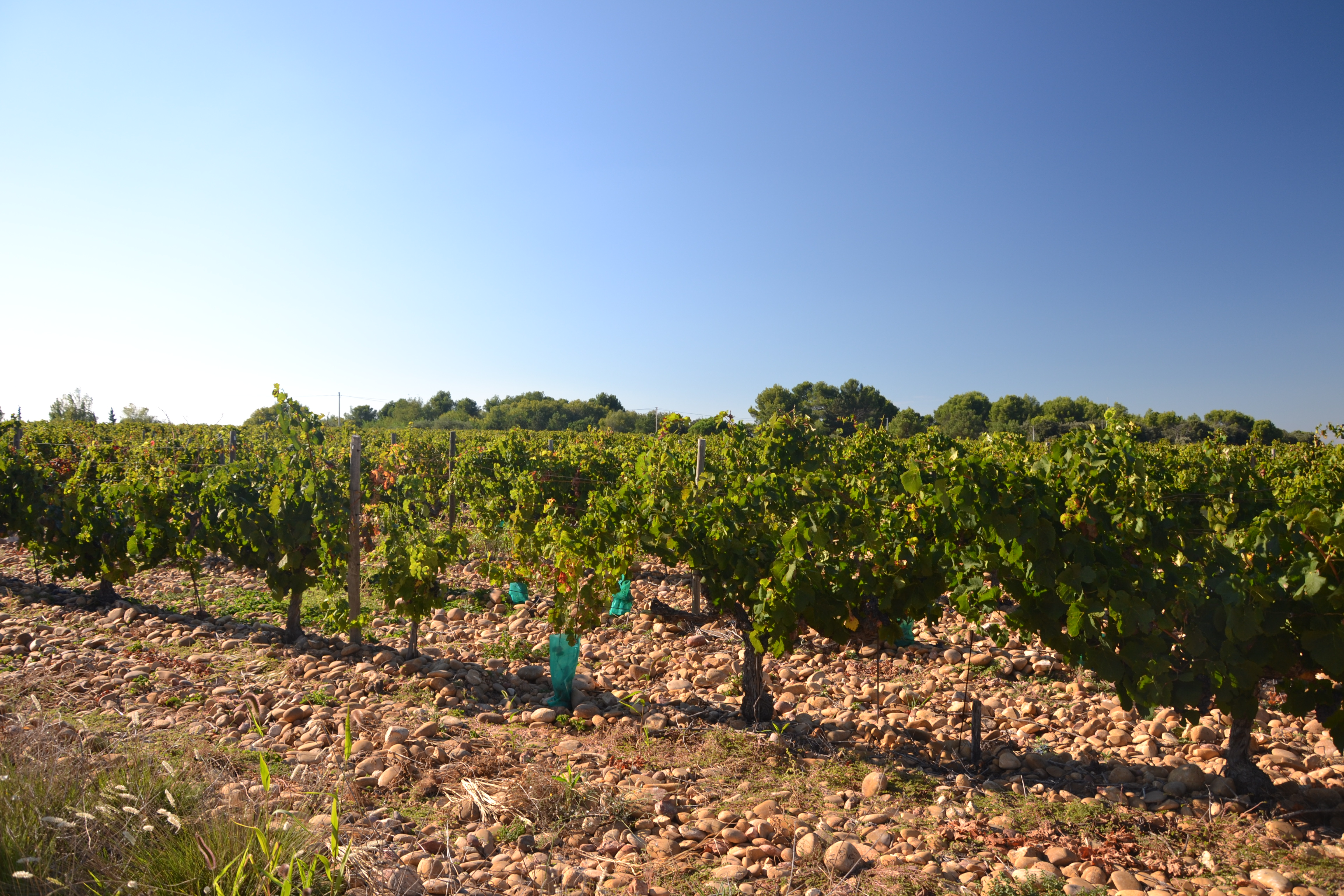 Vignes de l'AOC Gadagne